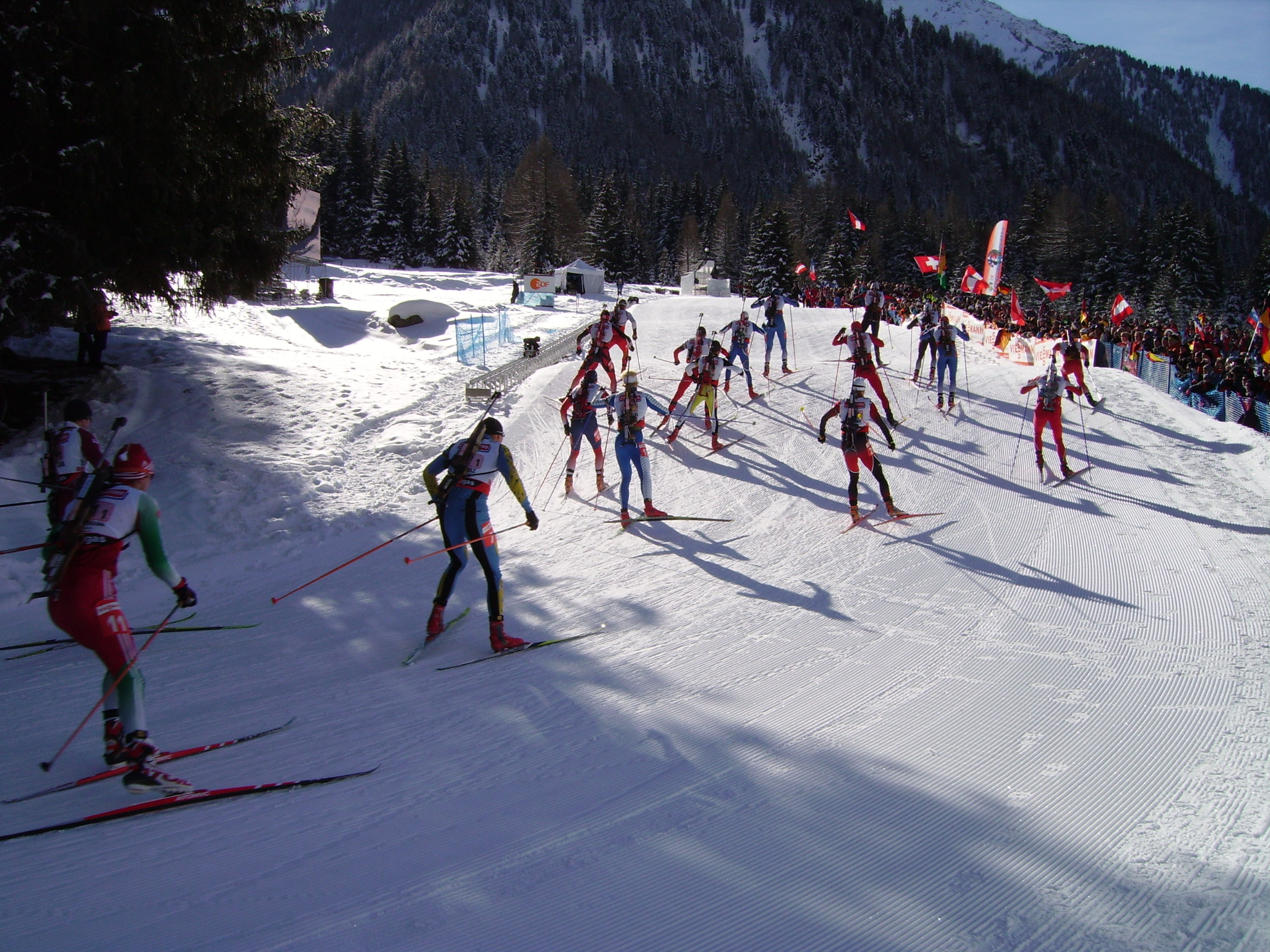 Staffetta maschile (prima frazione) ai Mondiali di biathlon di Anterselva 2007: salita della Huber